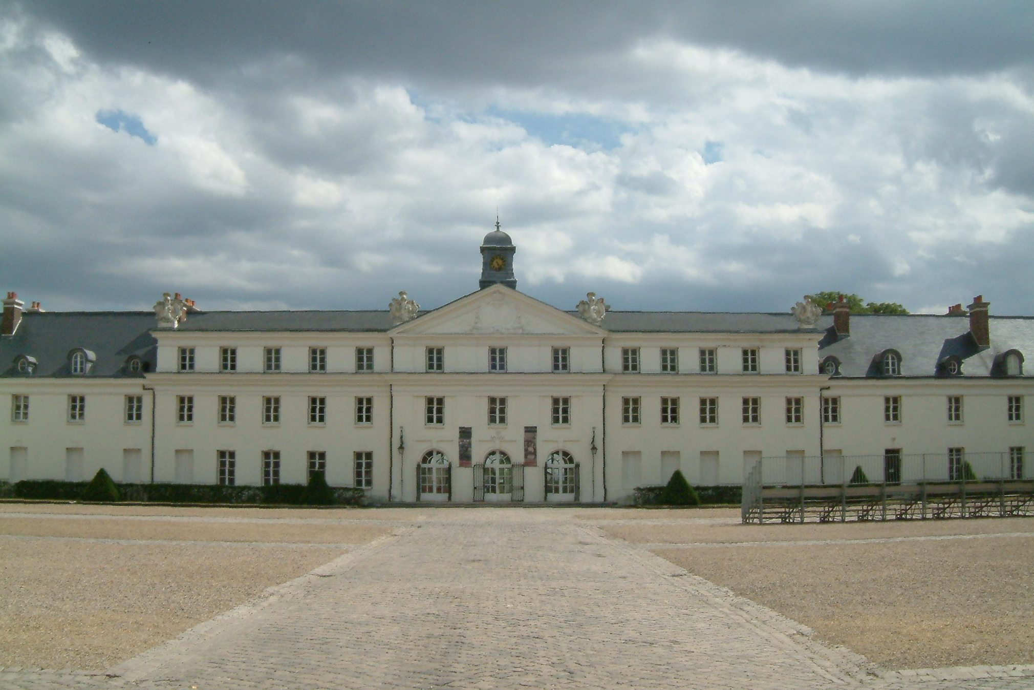 Château de la Verrerie, vue de la cour intérieure. Le Creusot, Bourgogne, FRANCE.